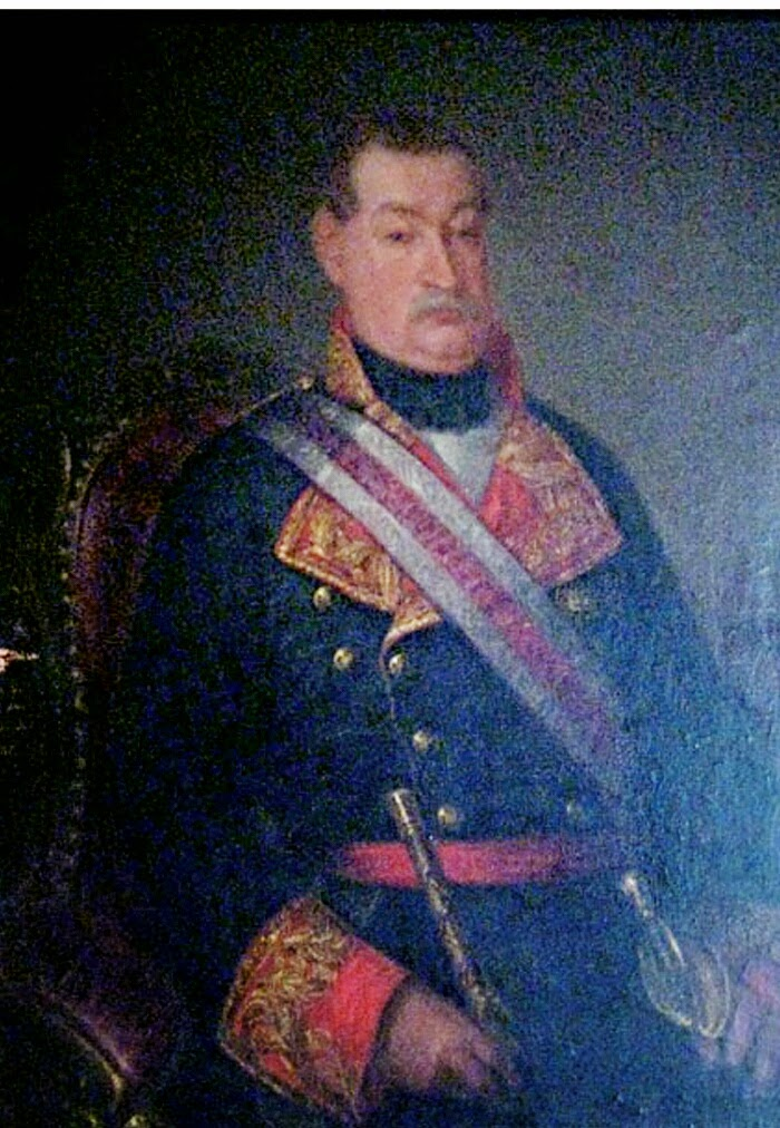 Retrato del General Azlor de Aragón. José Gutiérrez de la Vega López. 1860. Colección privada. LABORATORIO DE ARTE, 24 (2012), pp. 813-817.